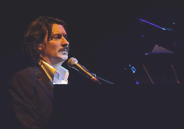 Autore: Vincenzo Iaconianni Fonte: Fotoguru.it Descrizione: Il cantautore Sergio Cammariere Licenza: CC-BY-SA 3.0